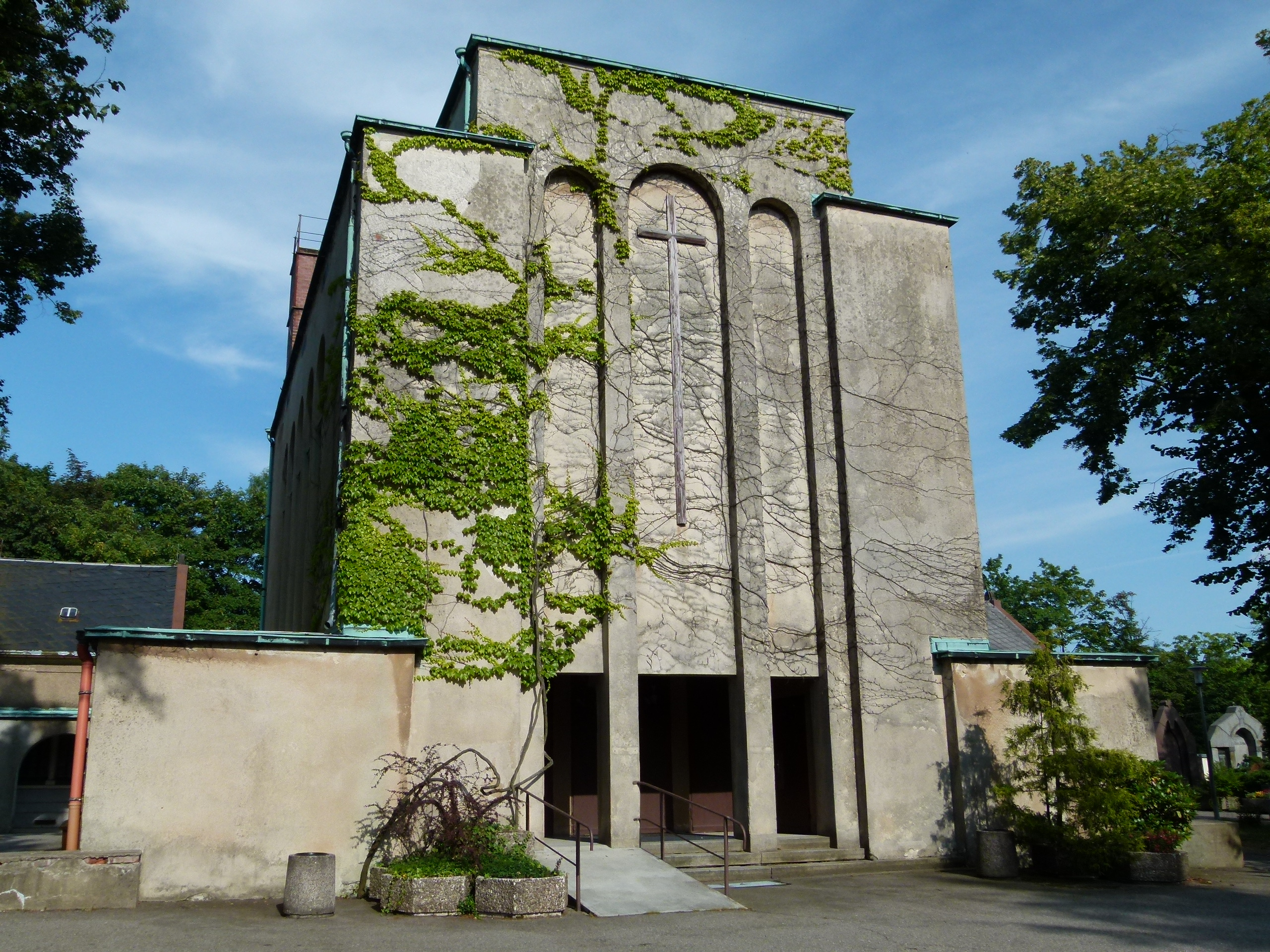 Denkmalgeschütztes Krematorium (Feierhalle) des Donatsfriedhofs in Freiberg, Sachsen